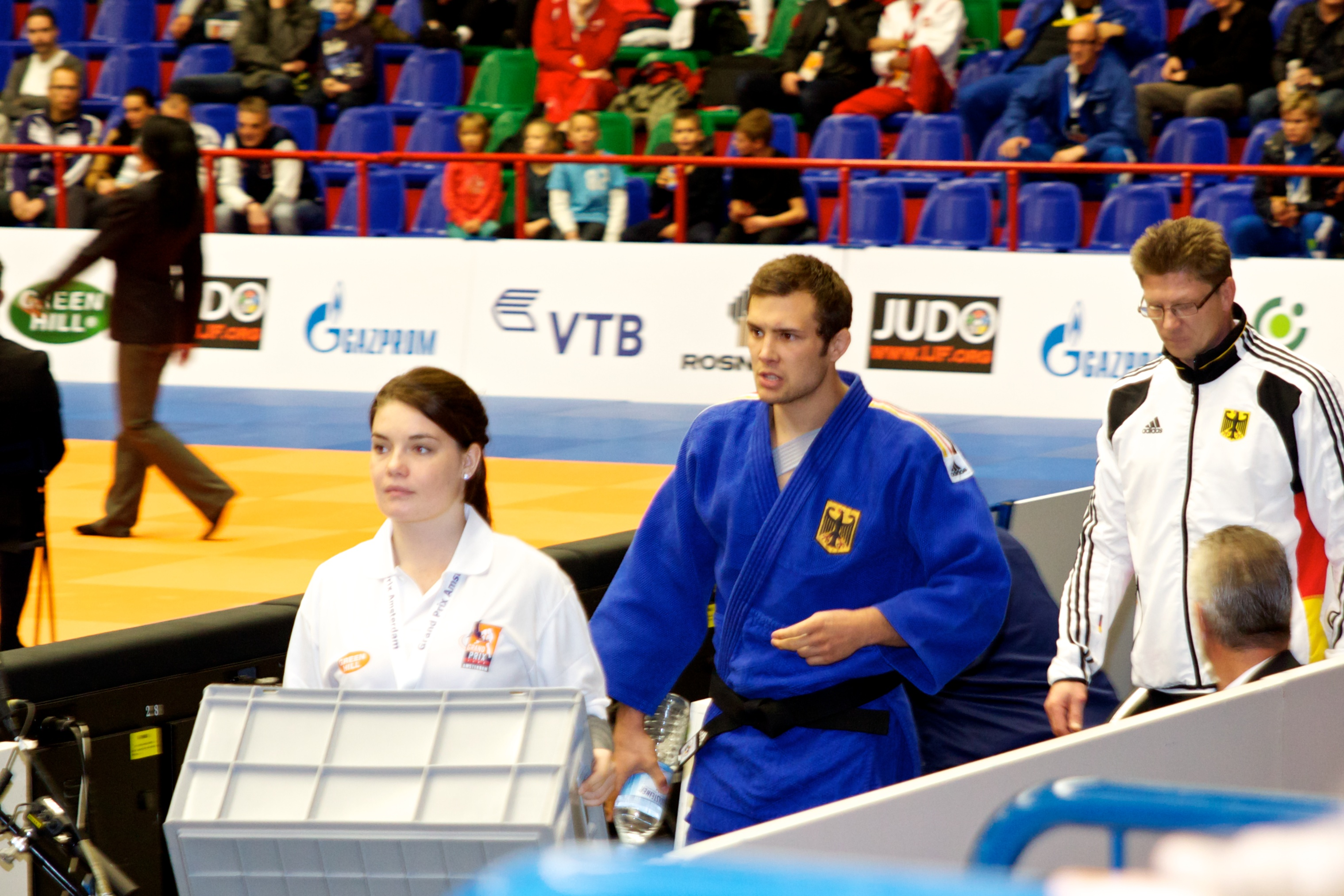 2011, World Cup in Amsterdam. Christophe in Begleitung von seinem Trainer Sven Loll auf dem Weg zur Matte.